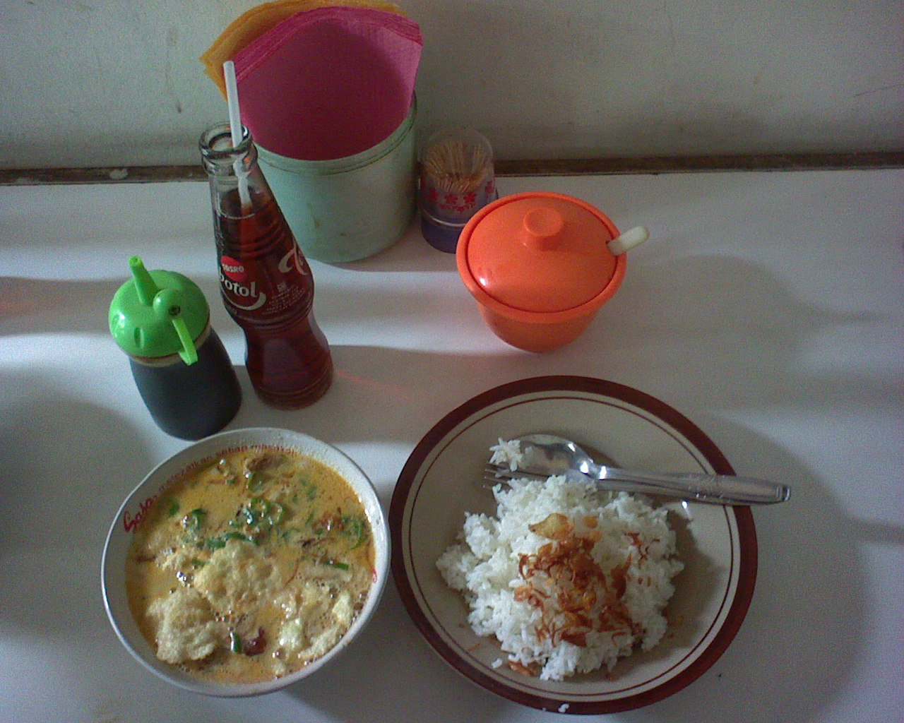 Soto Betawi